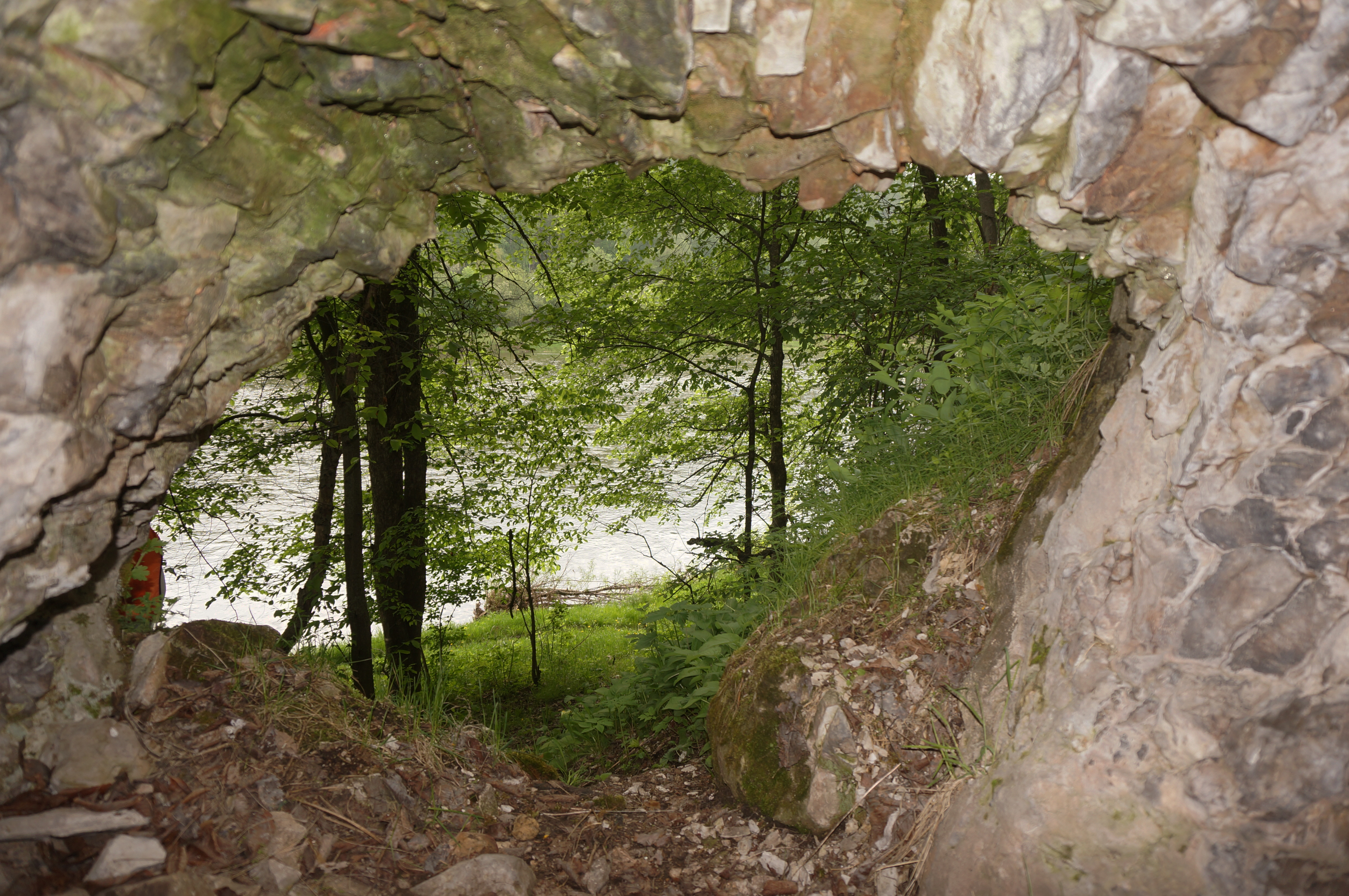 Салаватская пещера: Усть-Катавский городской округ, Челябинская область This image is related to the protected area of Russia number 7410293